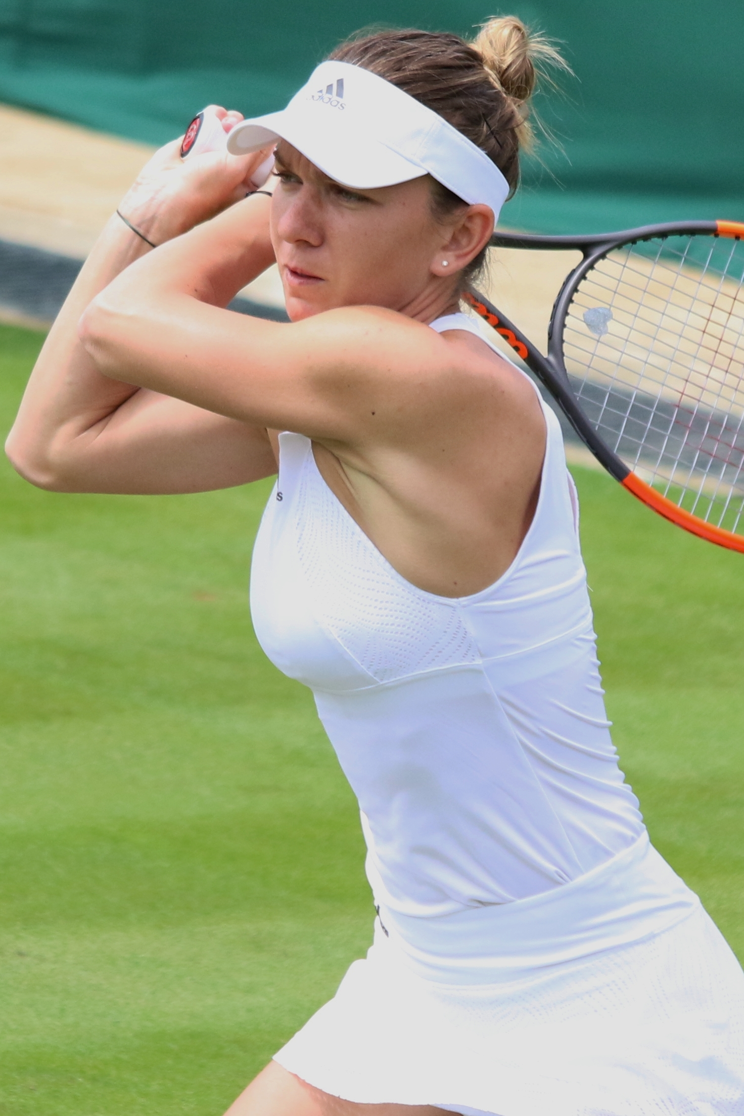 Halep WM17 (46)